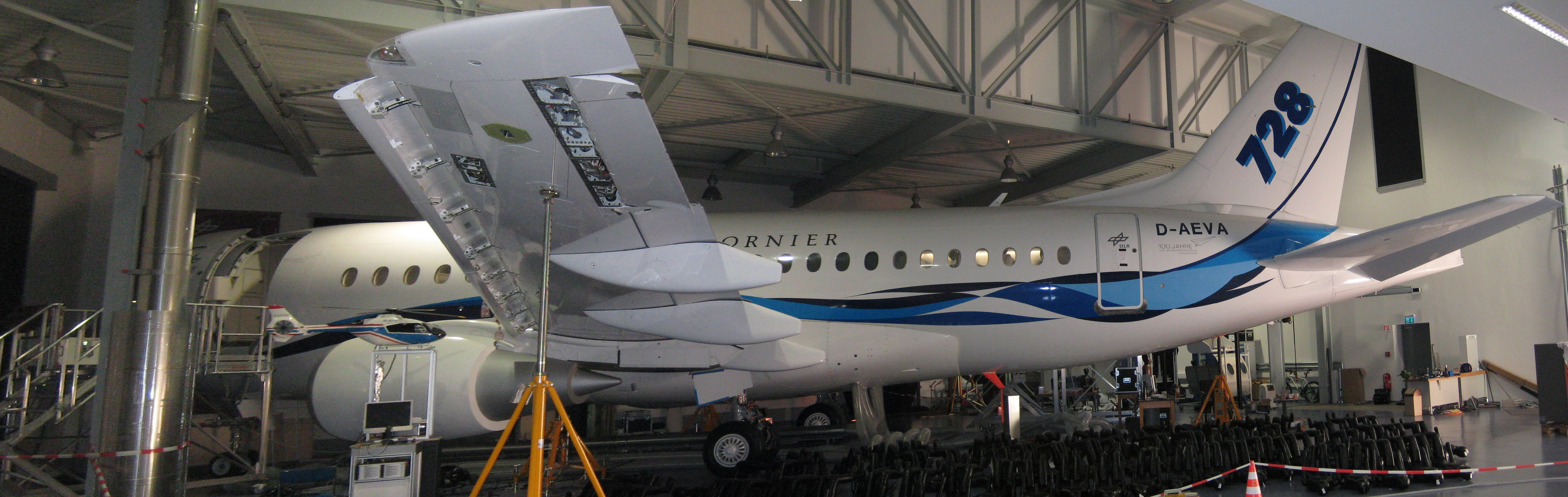 Dornier Do 728 als Versuchsträger für die Klimaforschung an Bord von Flugzeugen